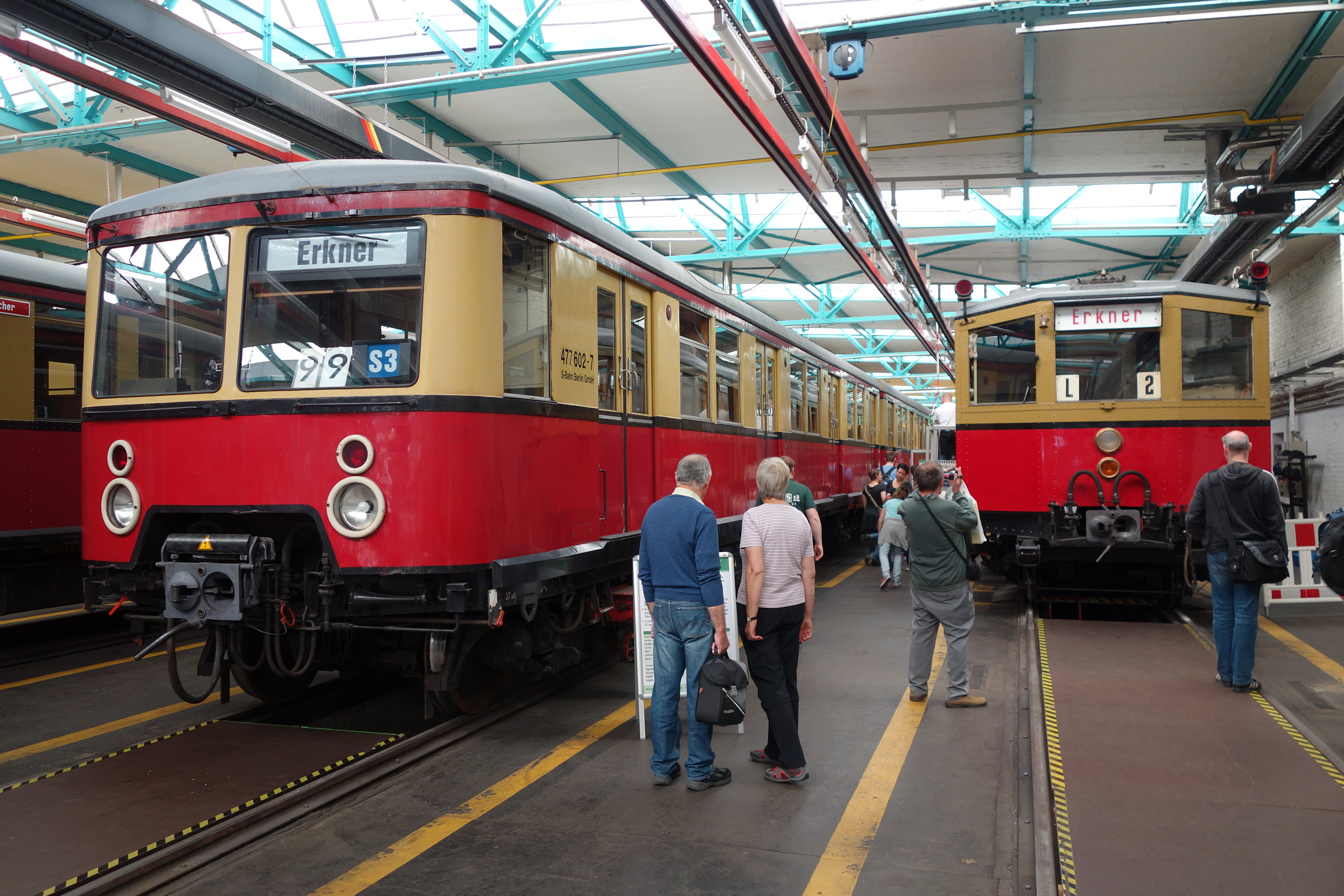 Triebwagenhalle Erkner der S-Bahn Berlin mit historischen Fahrzeugen der Baureihen ET 167 und ET 165